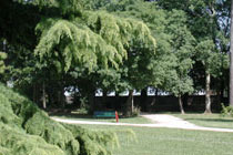 Parc municipal de Perrigny